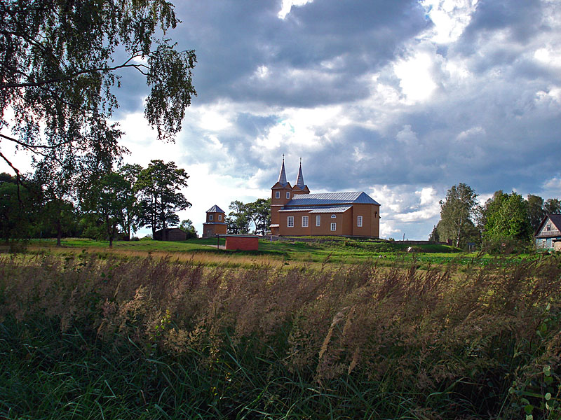 Fotogrāfs- Valentīna Siliniece. Uzņemts 19.07.2007. Kategorija:Romas katoļu baznīcas Latvijā Kategorija:Mērdzenes pagasts Kategorija:Rēzeknes-Aglonas diecēzes baznīcas